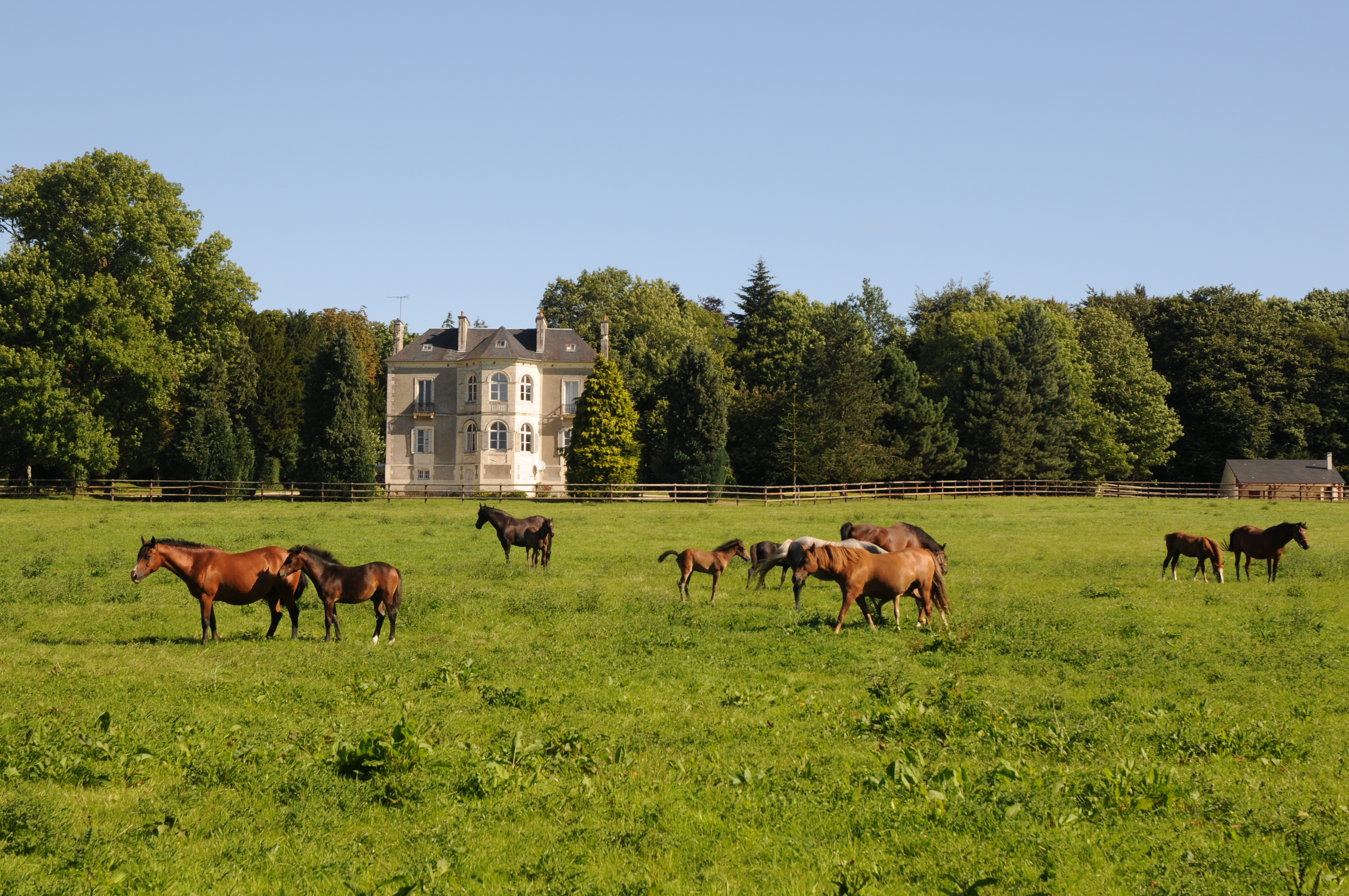 Chateau_des_Cours__Pirrefitte_en_Cinglais_97.JPG Calvados 14690